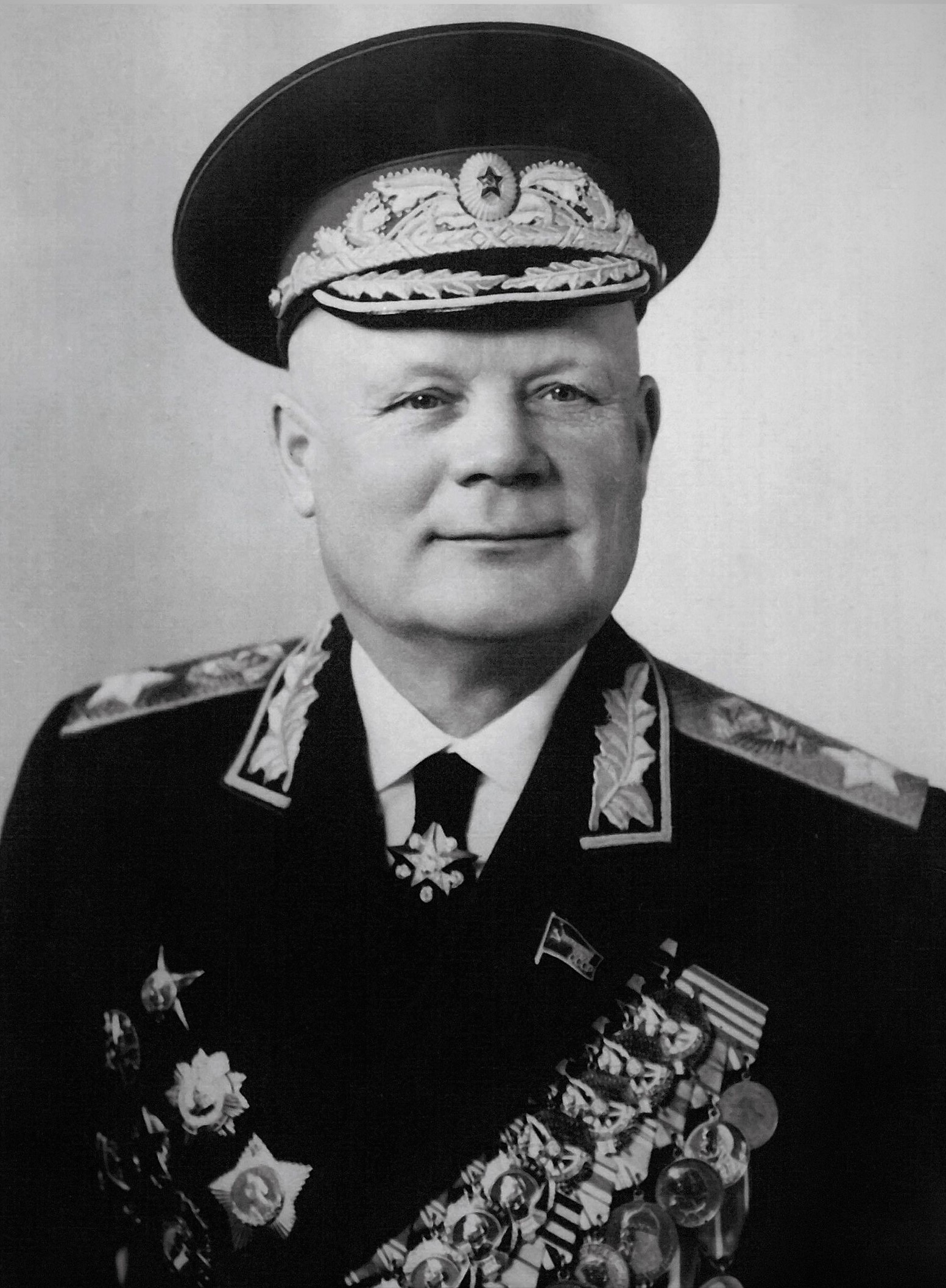 Маршал Советского Союза Филипп Иванович Голиков